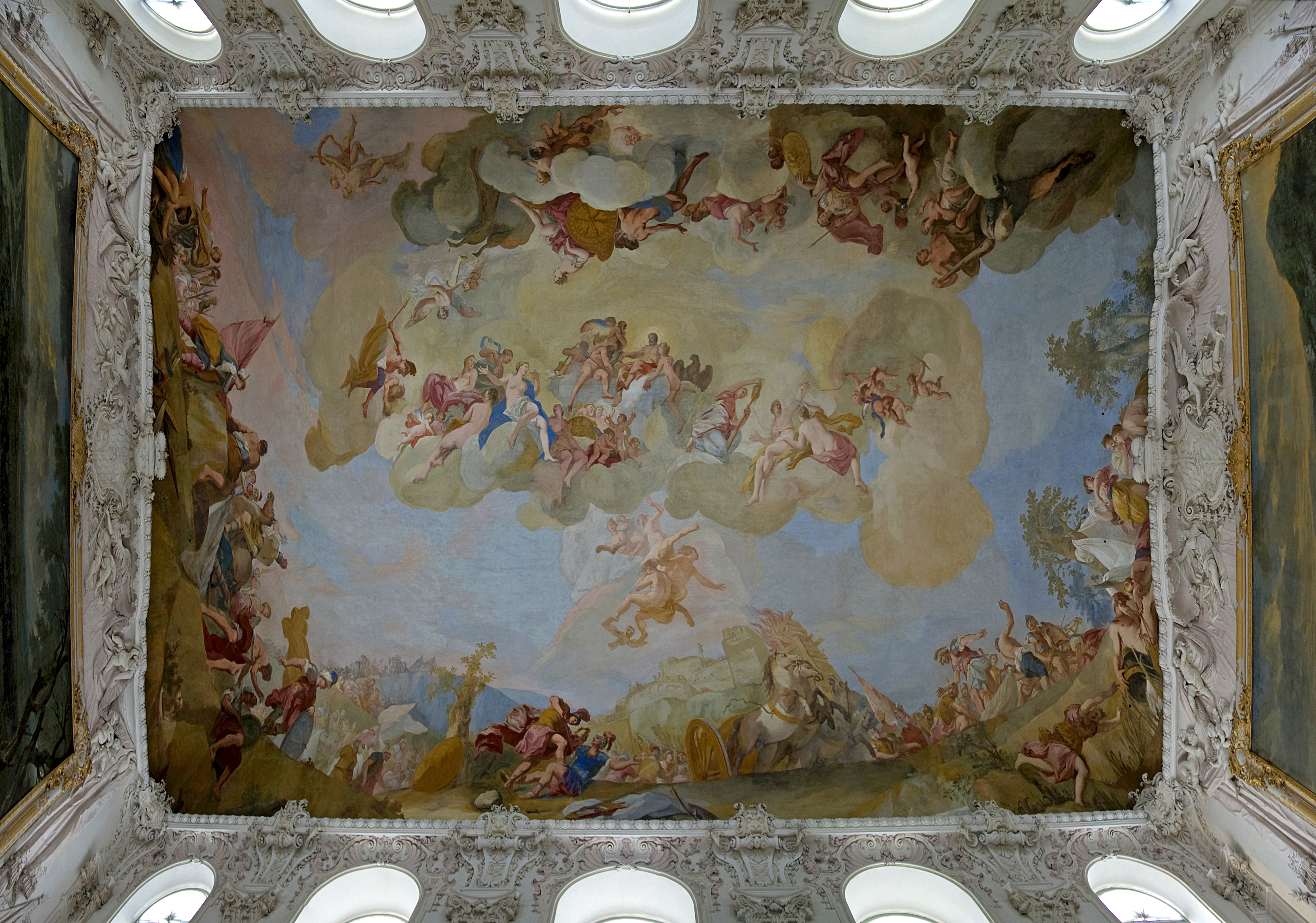 Neues Schloss Schleißheim - Großer Saal - Deckenfresco von Jacopo Amigoni (1682–1752) Alternative names Santiago Amiconi, Giacomo AmiconiDescriptionItalian painterDate of birth/death 1682 1752Location of birth/death Naples MadridWork location Venice, Southern Germany, England (1730-1739), Madrid (since 1747)Authority control : Q380897 VIAF: 30333378 ISNI: 0000 0001 1614 877X ULAN: 500016473 LCCN: n85017708 WGA: AMIGONI, Jacopo WorldCat creator QS:P170,Q380897 Zweikampf des Turnus mit Aeneas